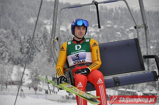 Dmitrij Wasiljew podczas konkursu drużynowego mężczyzn na skoczni normalnej podczas Mistrzostw Świata w Narciarstwie Klasycznym 2011 w Oslo.